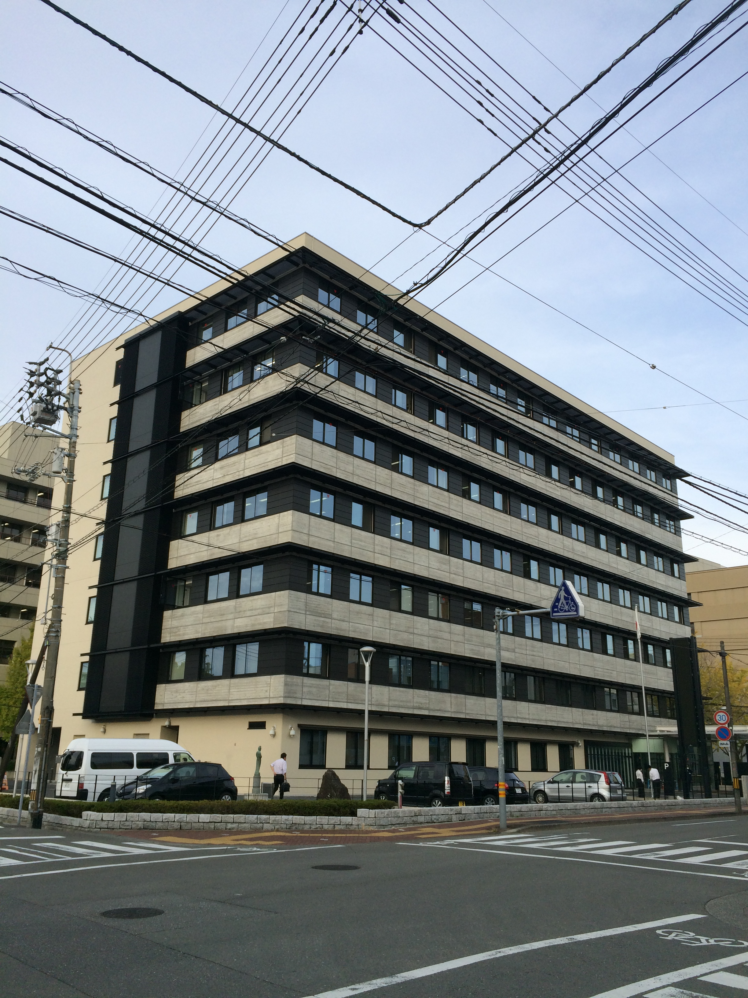 高知法務総合庁舎（高知地方検察庁、高知区検察庁、高知保護観察所、高松入国管理局高知出張所）